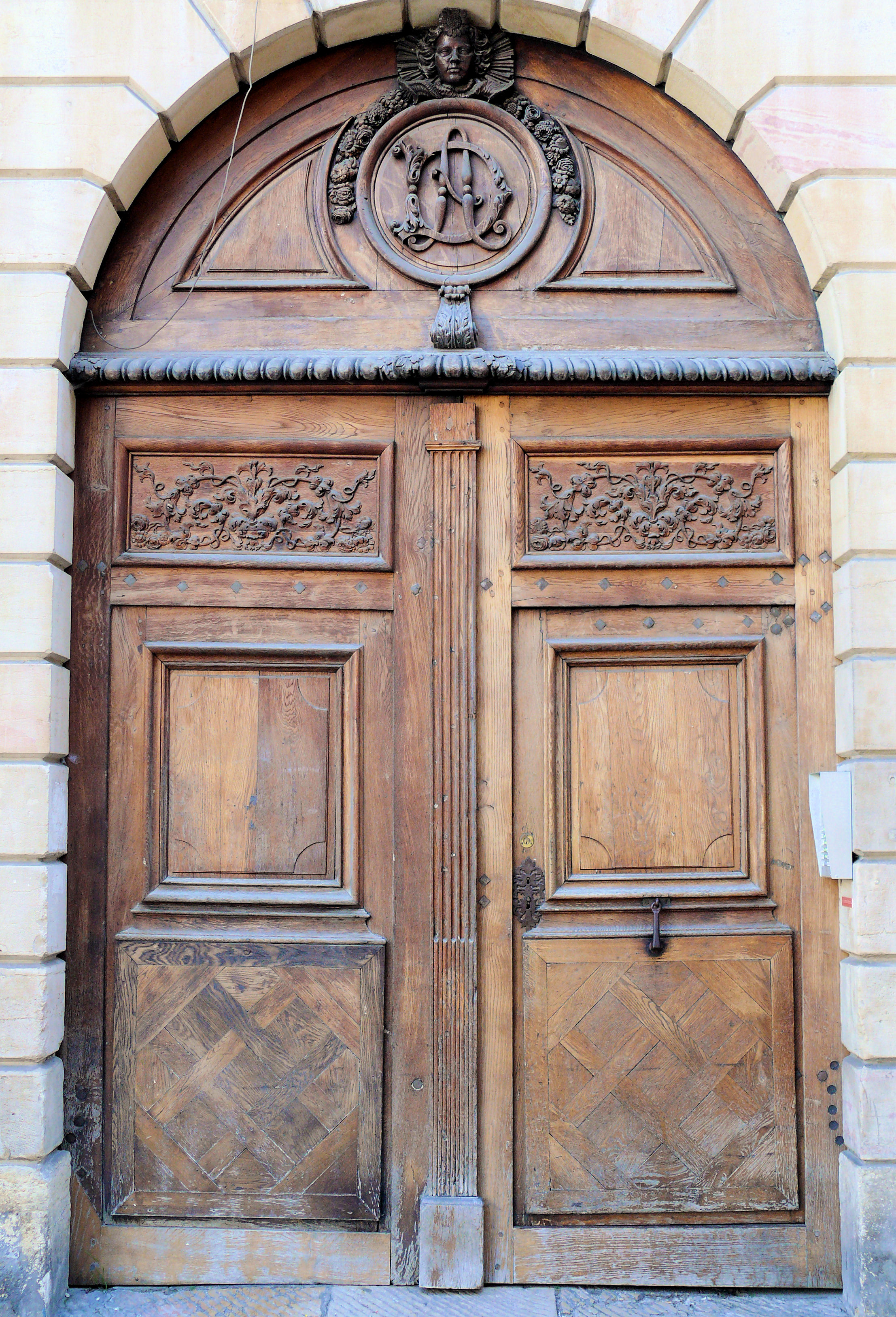 Dijon - Hôtel de Bretagne - Portail